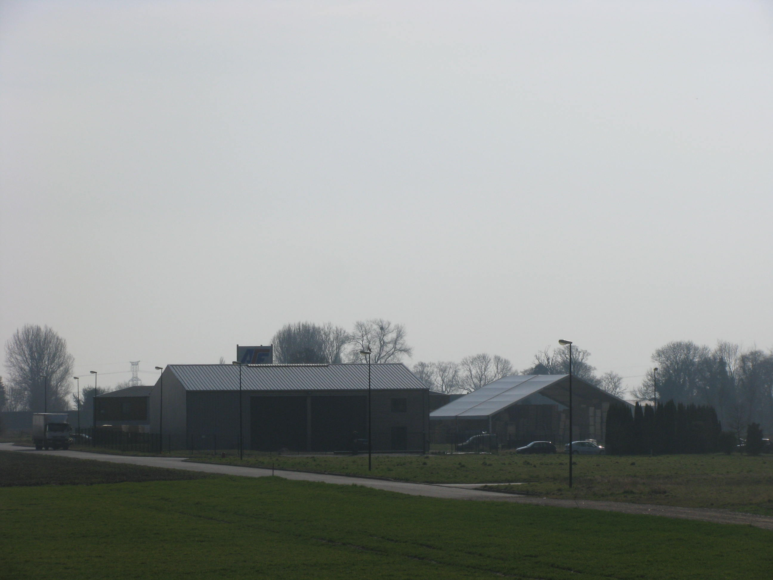 Zone Industrielle les Hayettes - Chepy